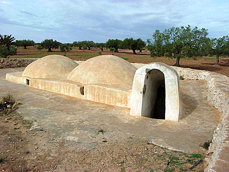 Djerba,unterirdische Moschee Foto Nr.03 vom 08.01.2002 Autor: Karl Heinz Paetzold